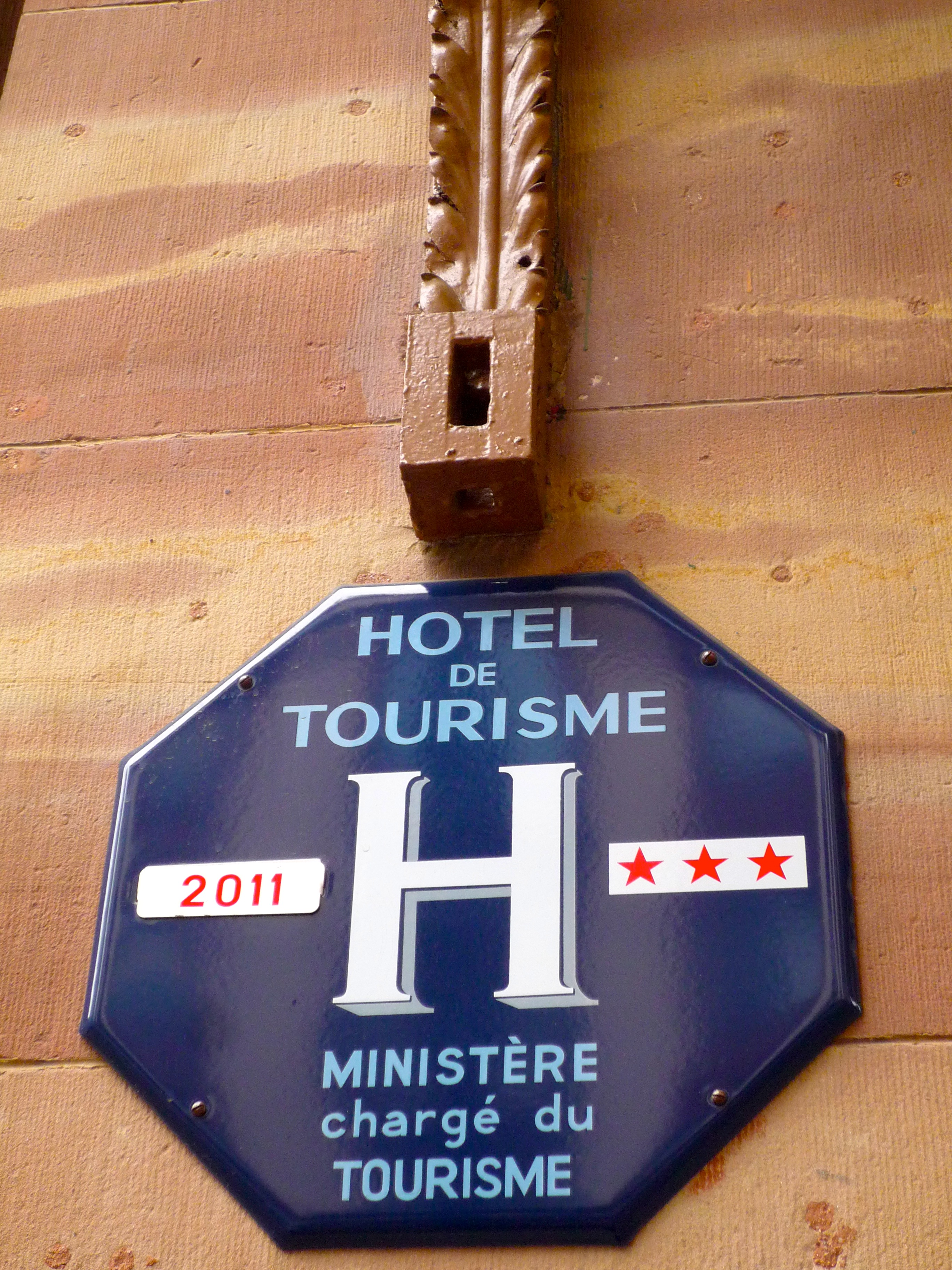 Strasbourg, 4 rue du 22 Novembre. Ancienne classification hôtelière sur l’hôtel Maison Rouge